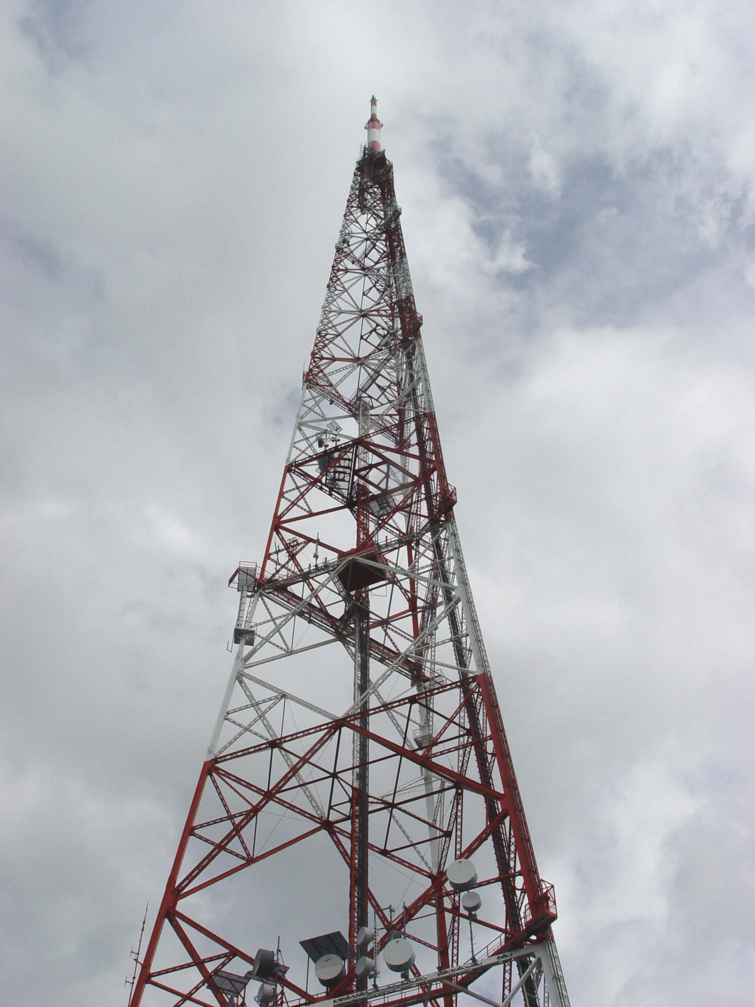 RTL-Antennepotto zu Diddeleng